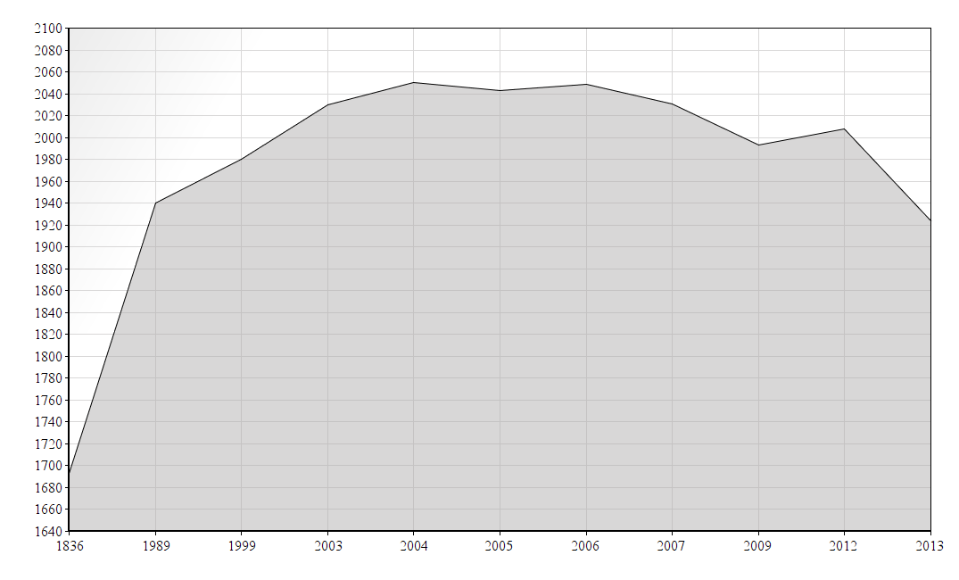 Dieses Bild zeigt die Bevölkerungsstatistik von Nordrach